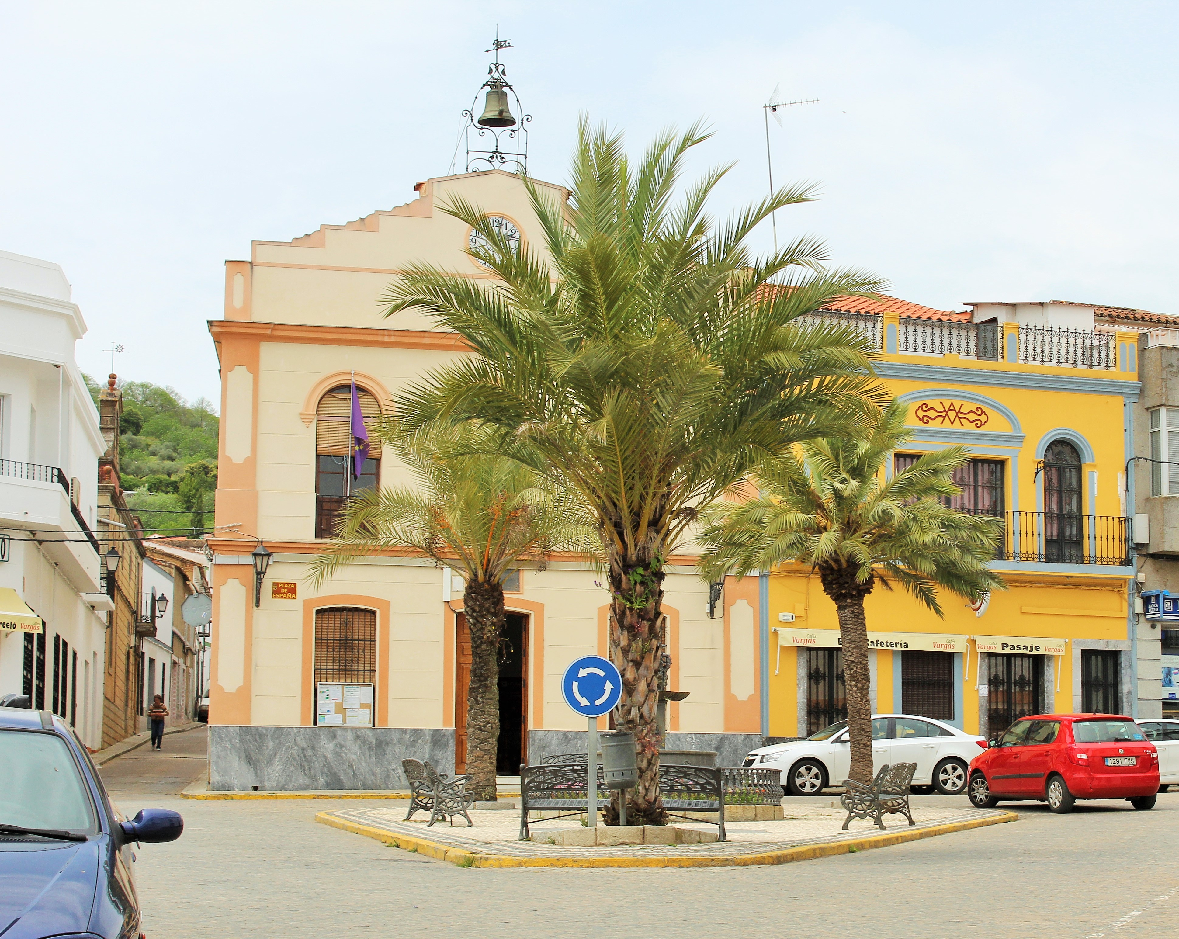 Ayuntamiento de Salvatierra de los Barros